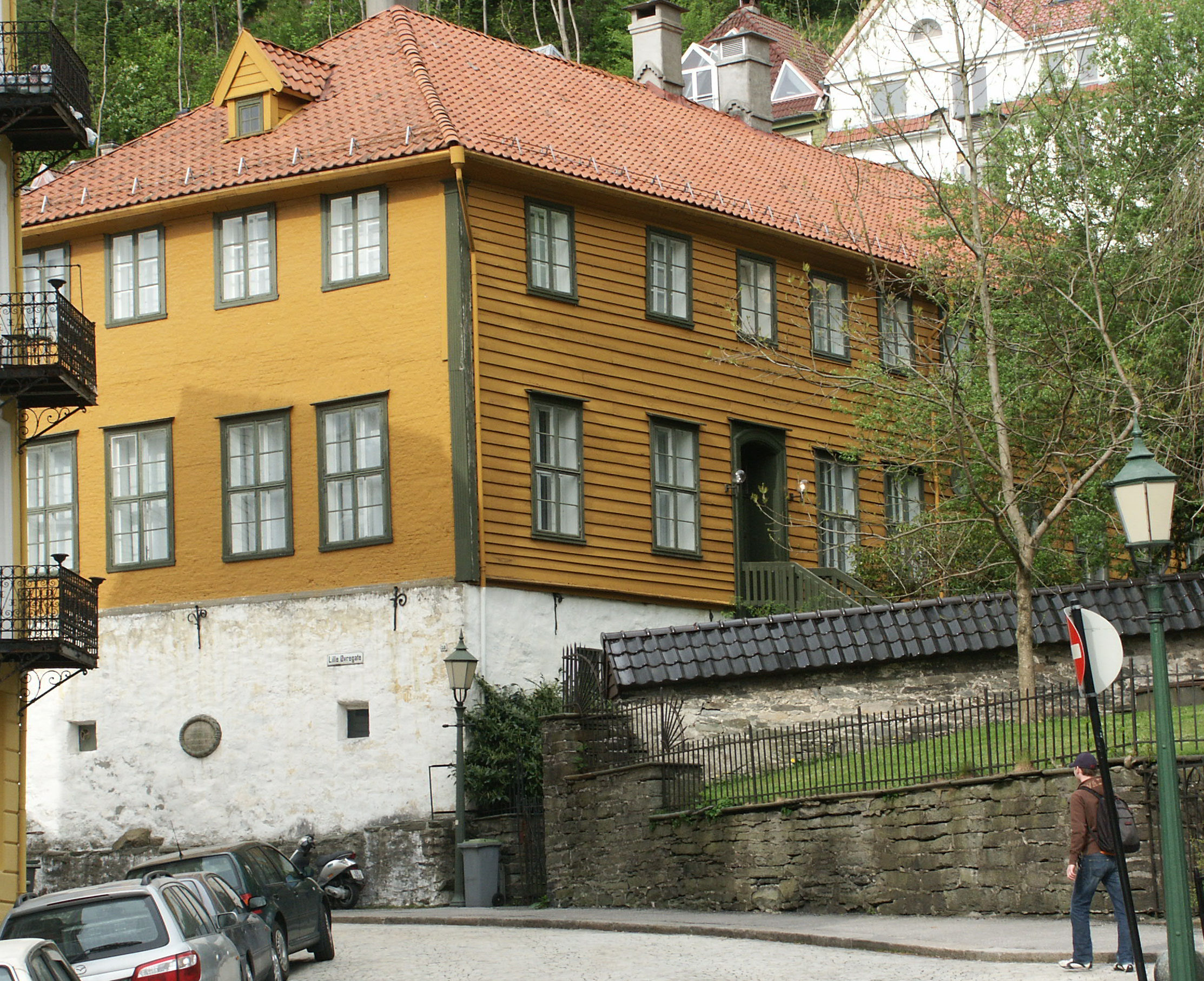 Bergen katedralskole in Bergen, Norway. Now a school museum.